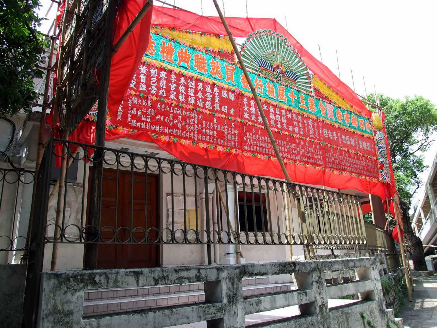 沙田鄉事委員會慶祝第三十屆委員會的花牌